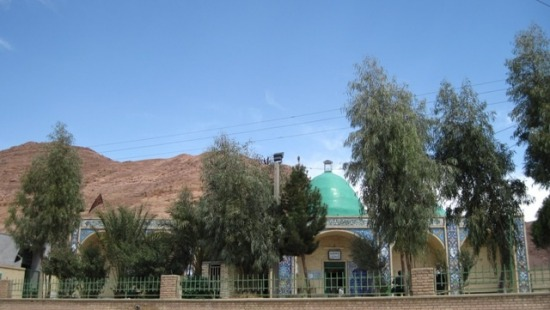 نمای بیرونی امامزاده سید جلال‌الدین